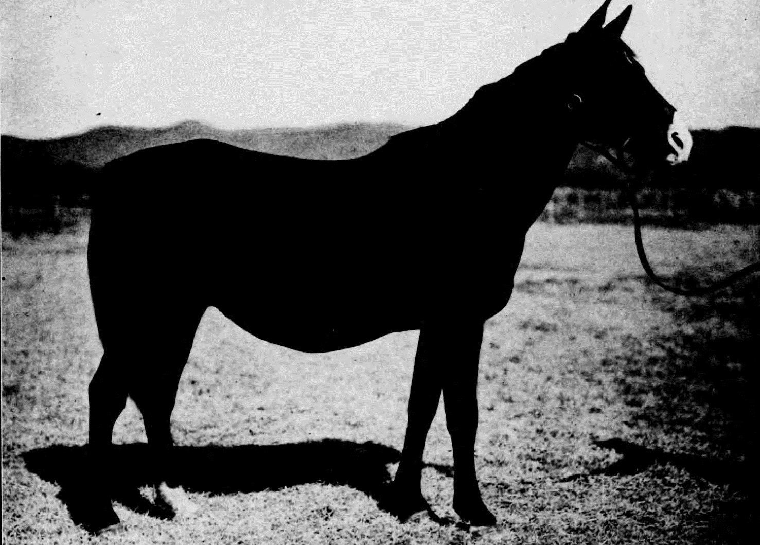 アングロアラブ(シャギア・アラブ)繁殖牝馬コハイランシー